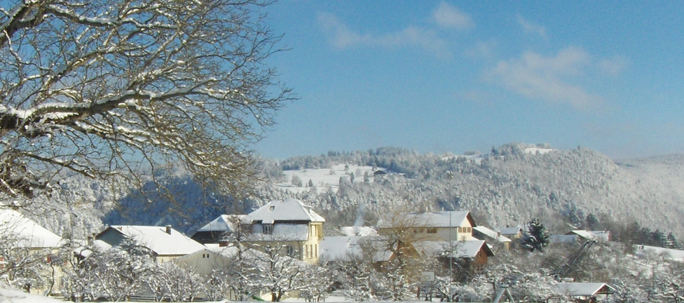 Sornetan im Berner Jura